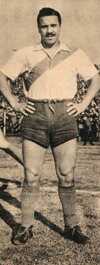 José Manuel Moreno, el histórico jugador del Club Atlético River Plate, antes de un partido contra Atlanta en 1946.